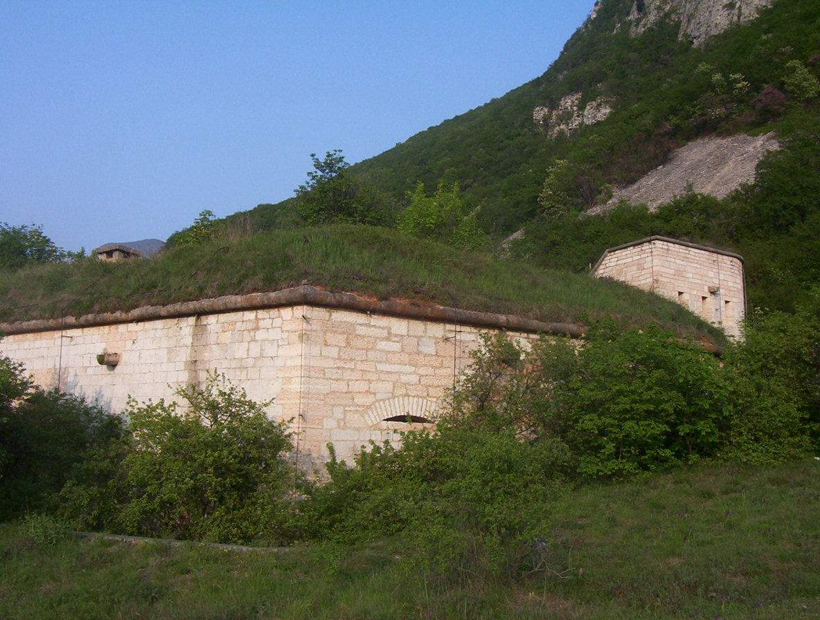 Forte di Ceraino, comune di Dolcè